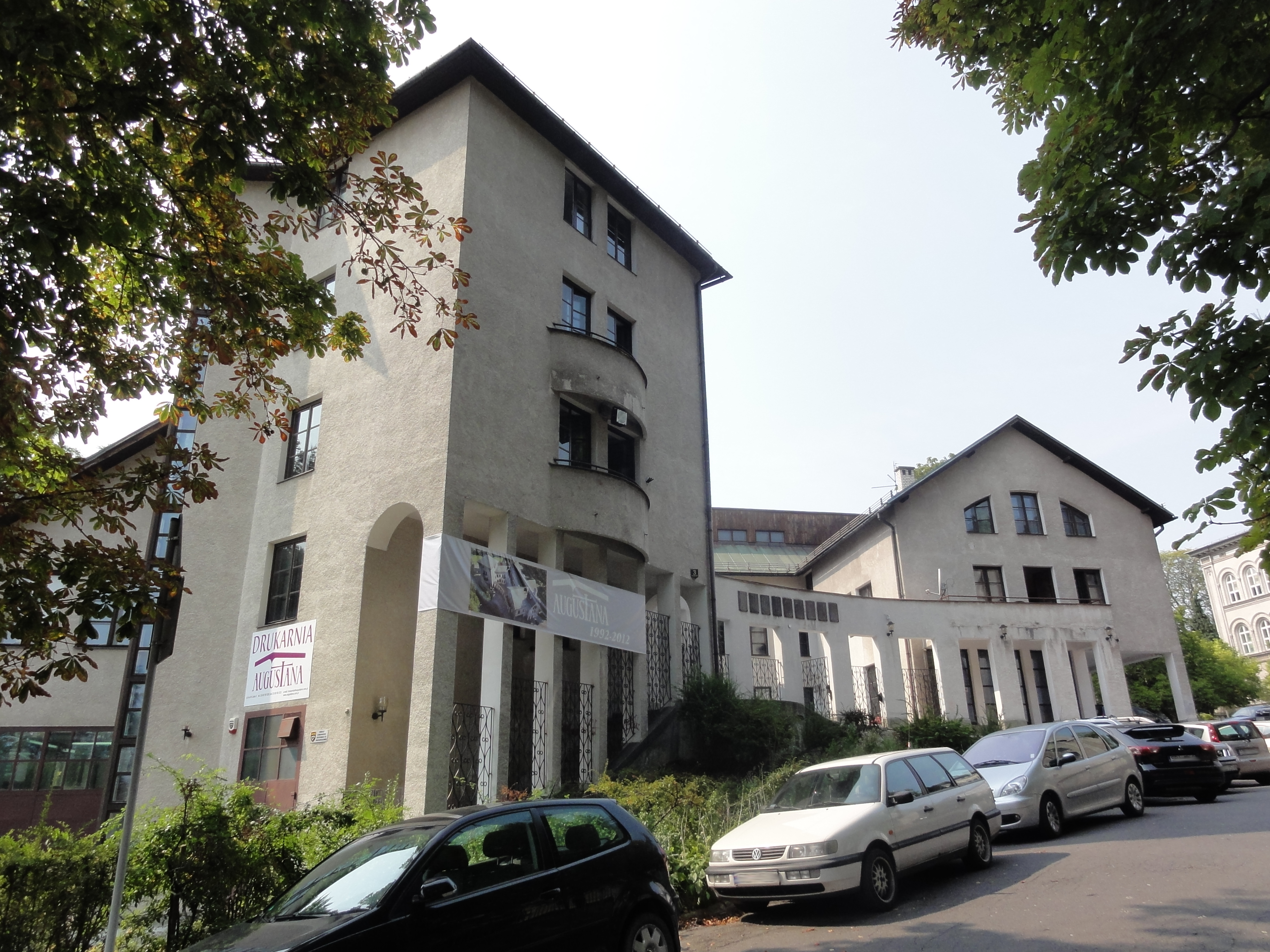 Drukarnia Augustana w Bielskim Syjonie